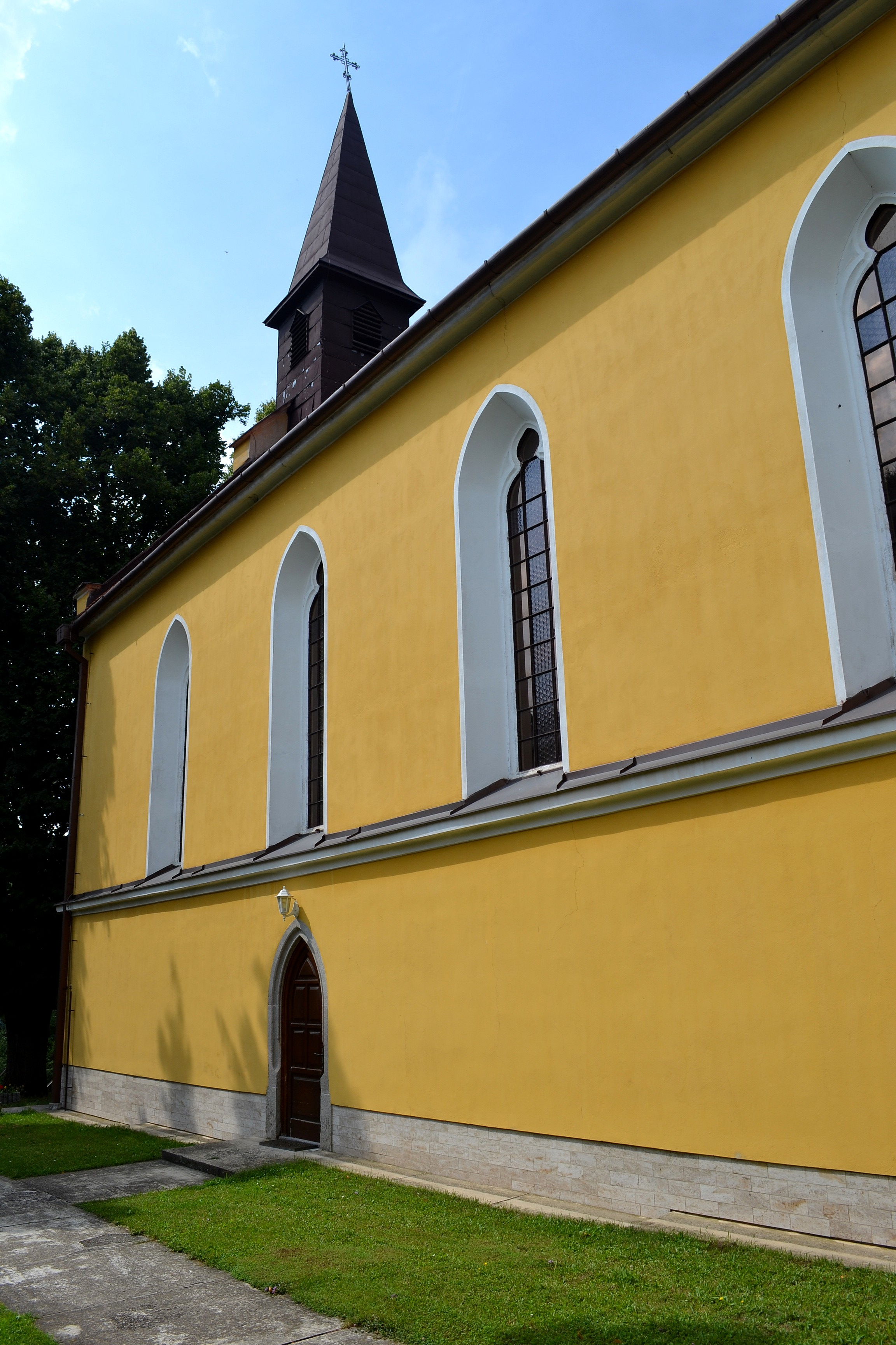 Severná stena kostola